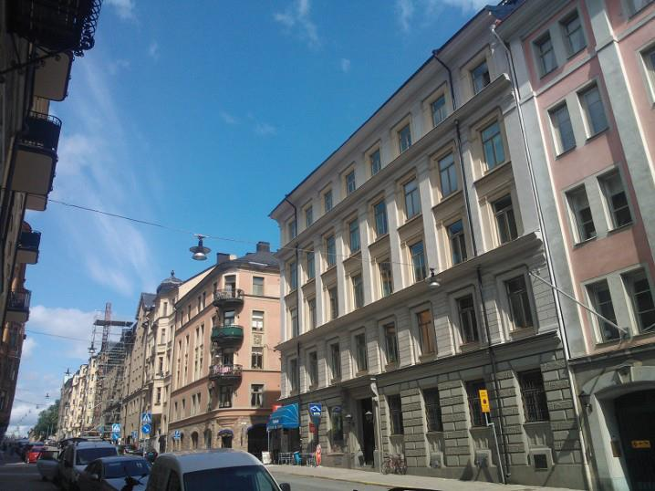 Styrmansgatan 8 i Stockholm, korsningen Riddargatan, fotograferad 2013